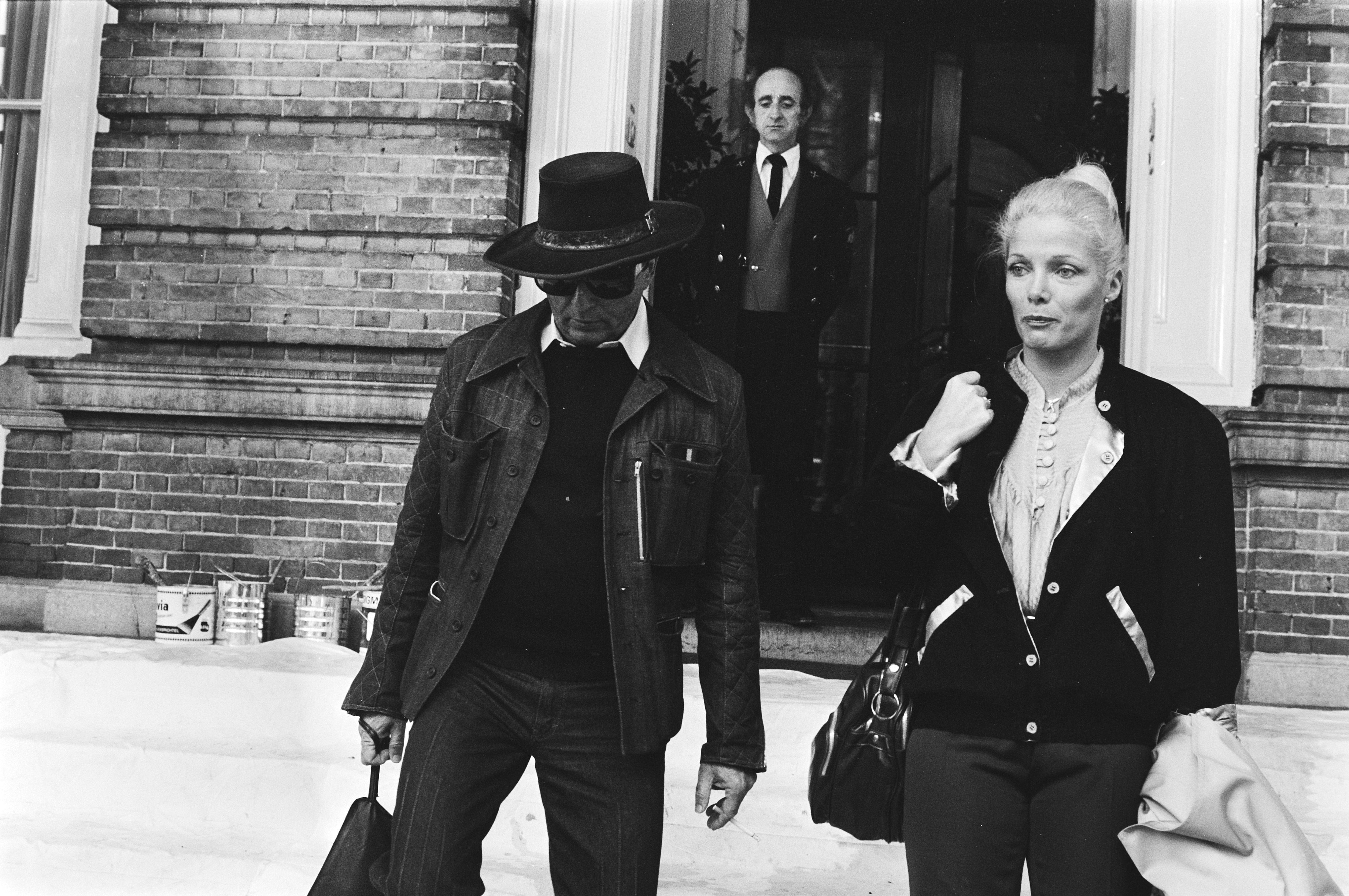 Collectie / Archief : Fotocollectie Anefo Reportage / Serie : Amerikaanse auteur Harold Robbins in ons land Beschrijving : Op de foto met zijn vriendin Ini Assman Datum : 5 november 1979 Locatie : Nederland Trefwoorden : bezoekers, schrijvers, vriendinnen Persoonsnaam : Assman, Ini, Robbins, Harold Fotograaf : Croes, Rob C. / Anefo Auteursrechthebbende : Nationaal Archief Materiaalsoort : Negatief (zwart/wit) Nummer archiefinventaris : bekijk toegang 2.24.01.05 Bestanddeelnummer : 930-5262